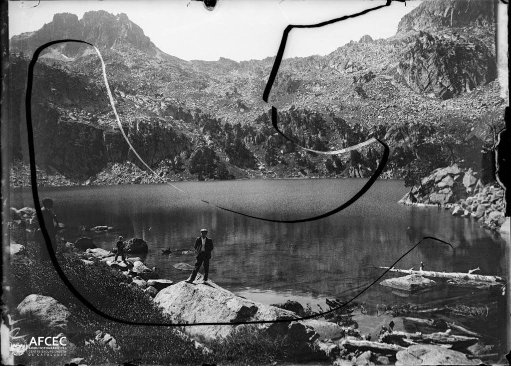 Imatge